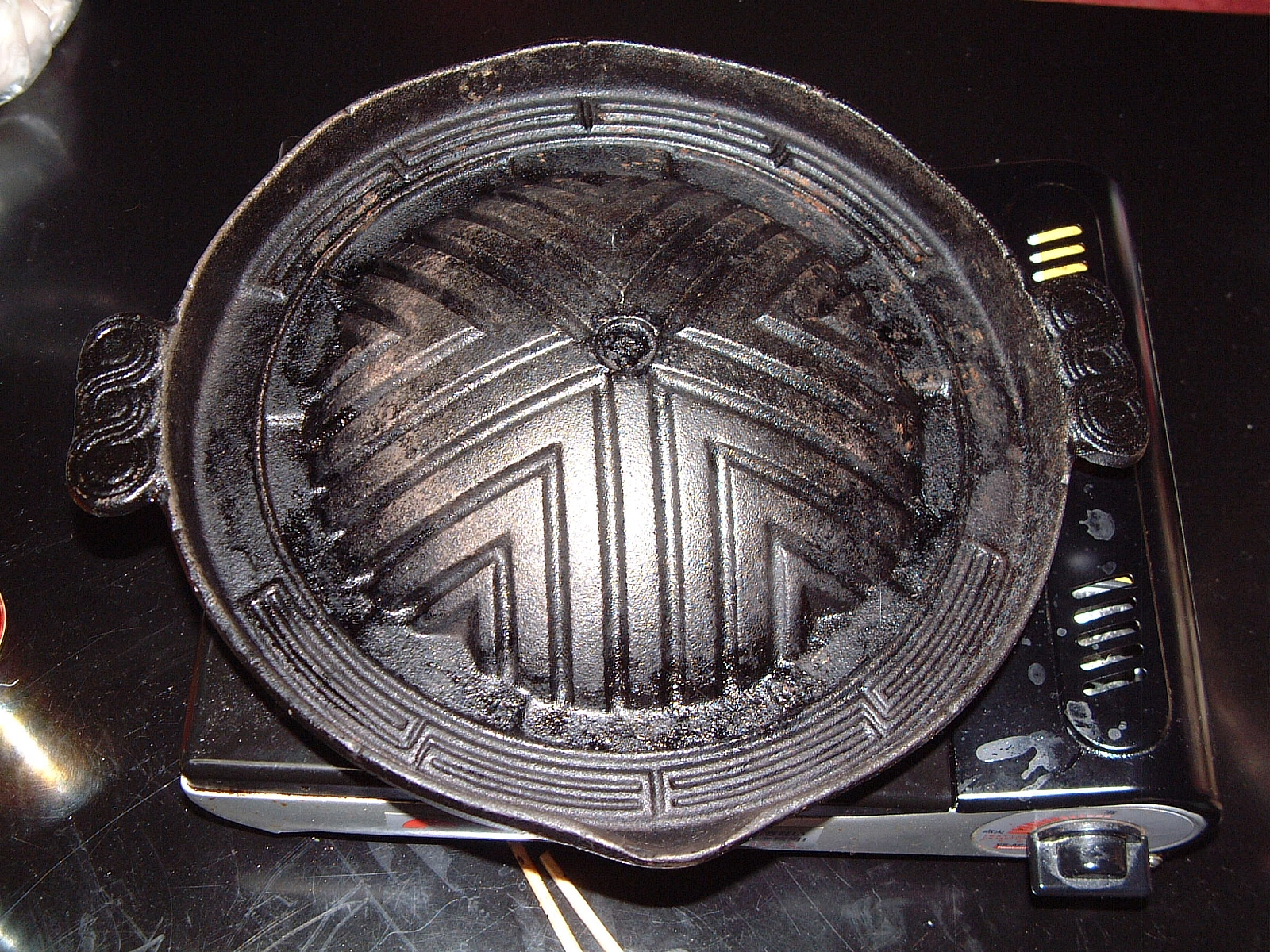 ジンギスカン鍋。投稿者の自宅で撮影。